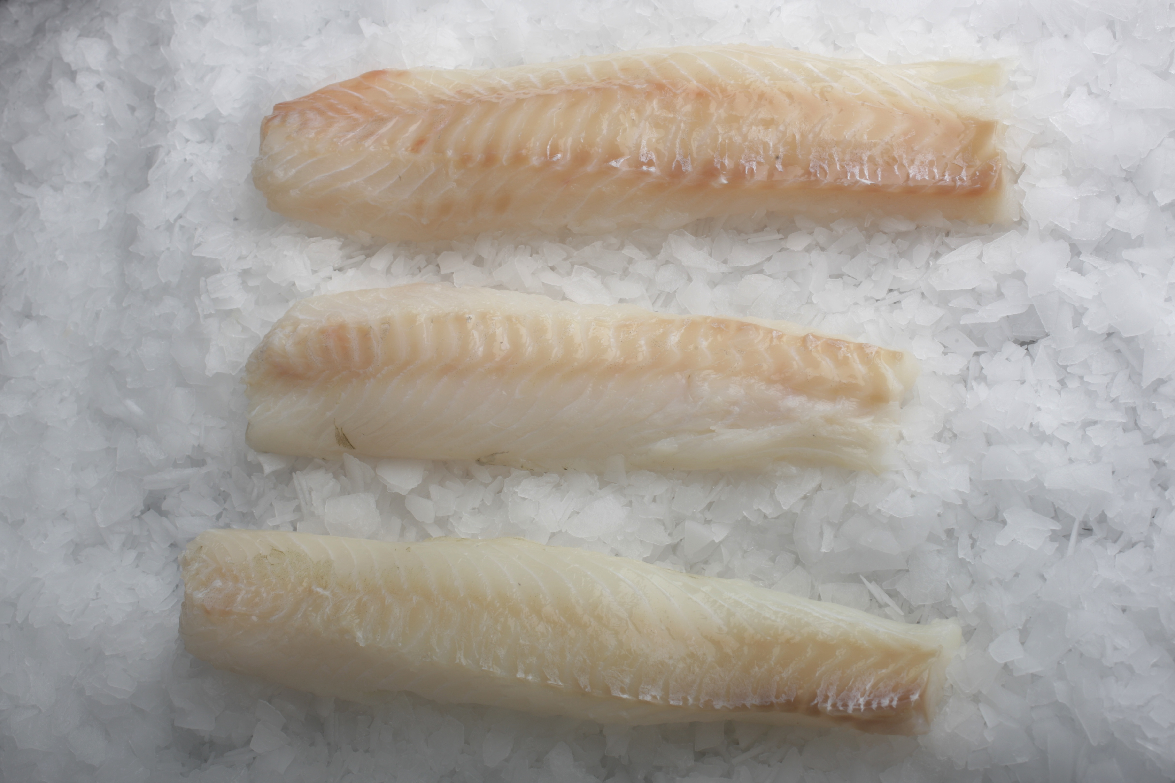 Questo è il dorso (o anche chiamato cuore) del gadus macrocephalus. Senza pelle e senza spine.